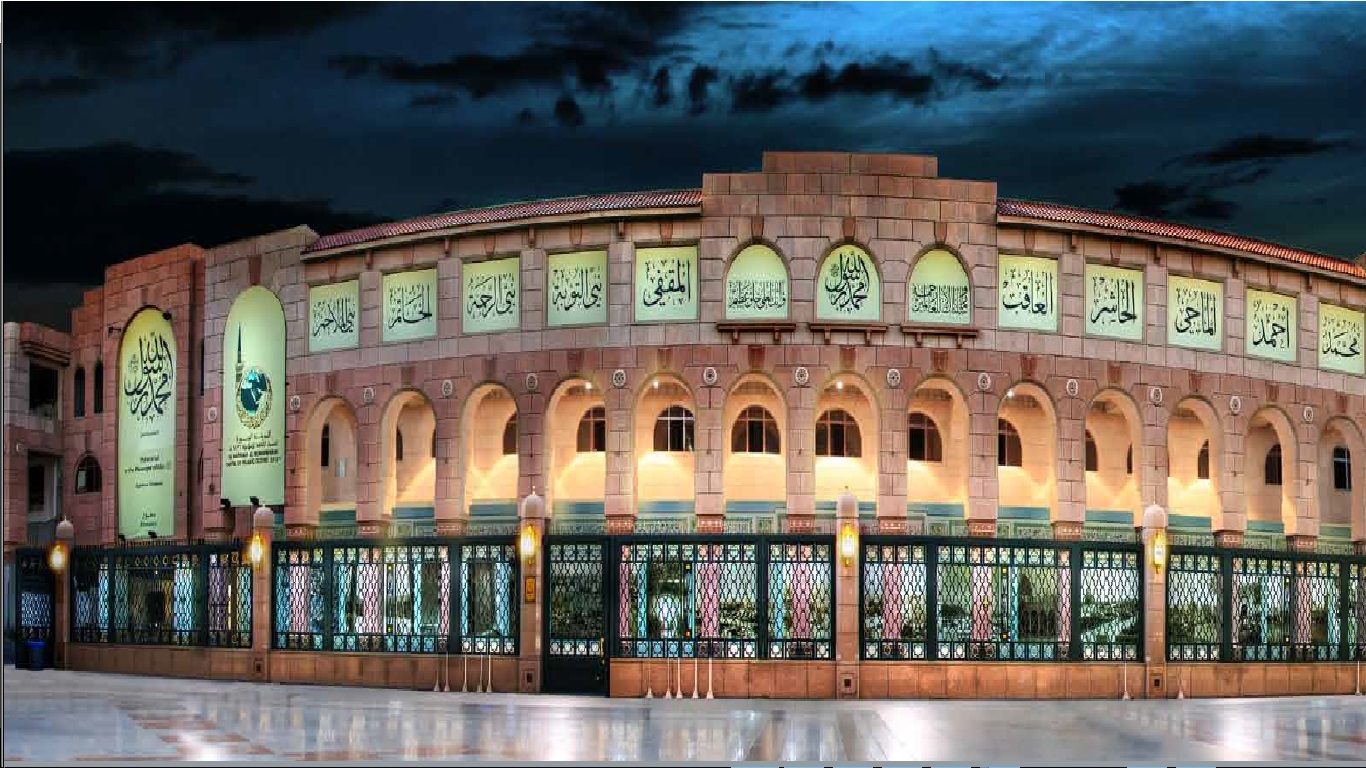 واجهة معرض محمد رسول الله صلى الله عليه وسلم